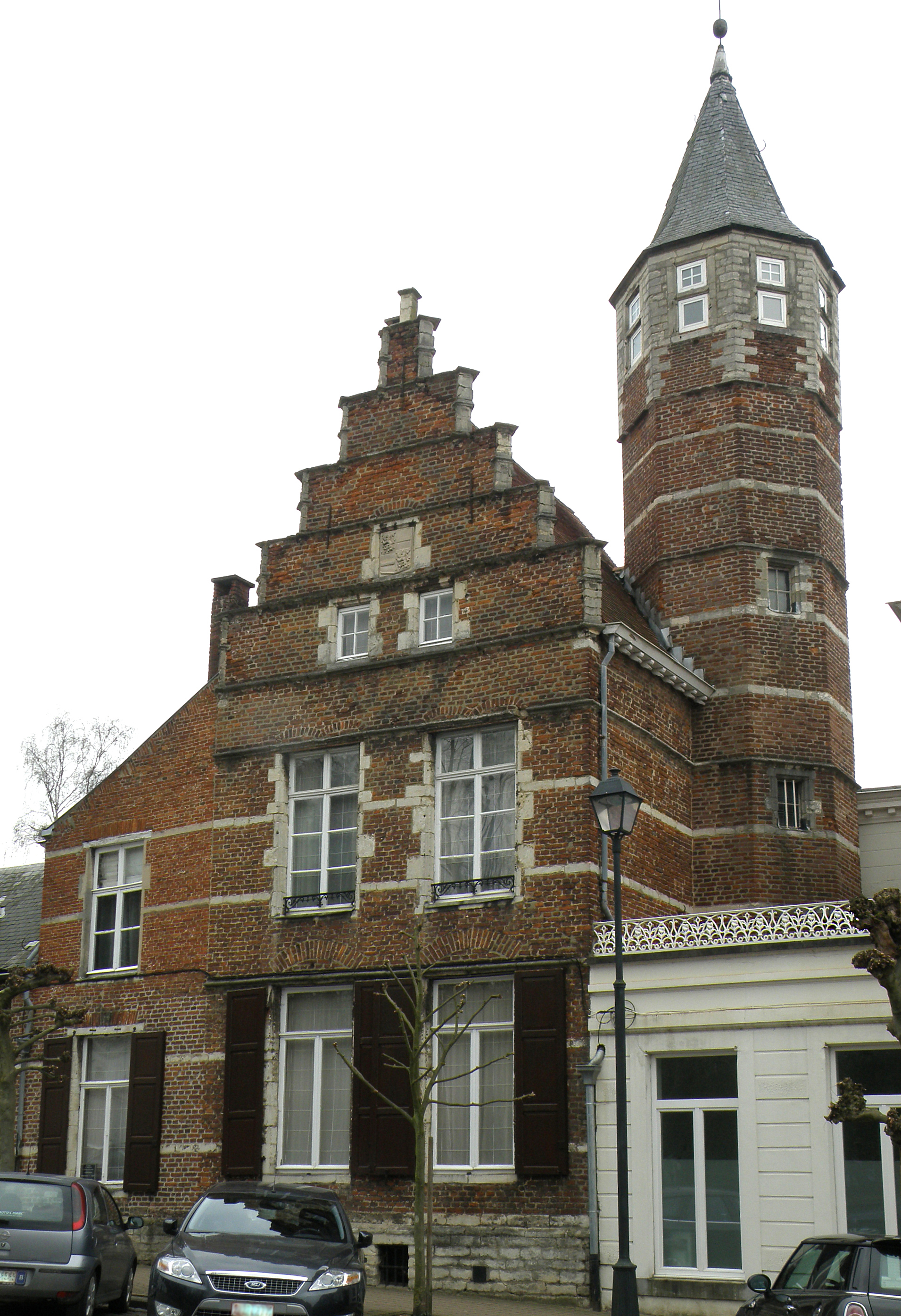 Diest (prov. Vlaams-Brabant, België). Residentie van de Prins van Nassau, Graanmarkt nr. 19.